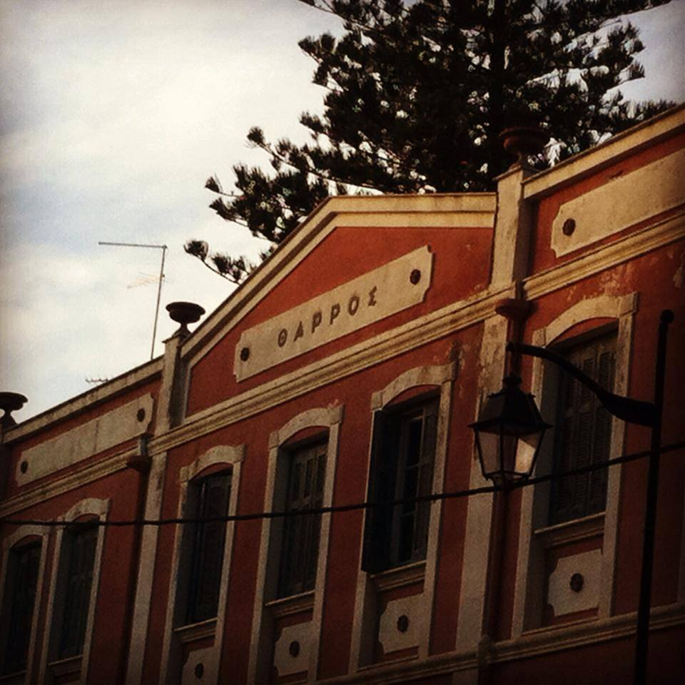 Το κτήριο του Θάρρους